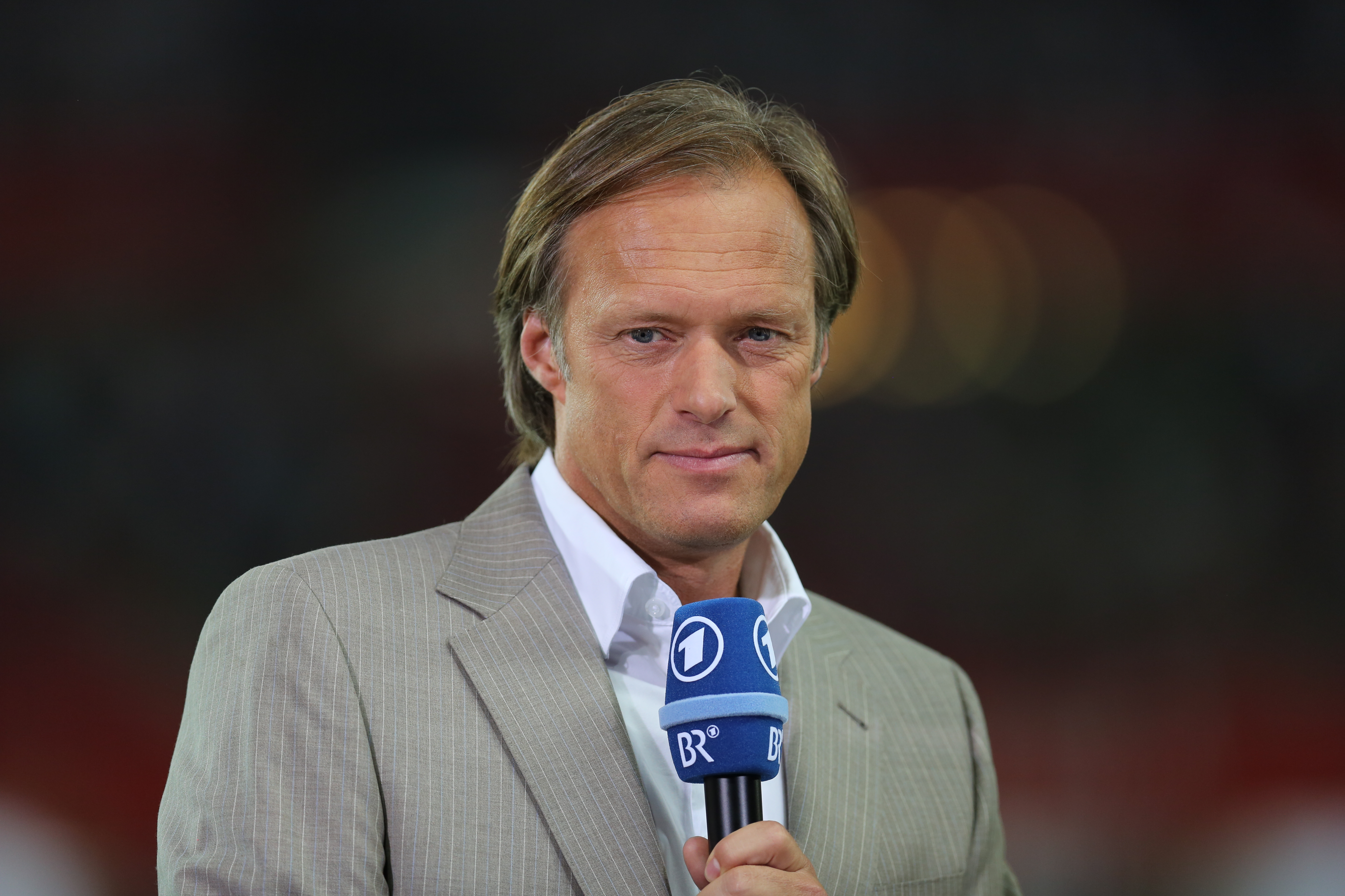 Fußball-Weltmeisterschaft 2014/Qualifikation (UEFA), Gruppe C, 11. September 2012, Österreich gegen Deutschland im Wiener Ernst-Happel-Stadion. The making of this work was supported by Wikimedia Austria. For other files made with the support of Wikimedia Austria, please see the category Supported by Wikimedia Österreich.